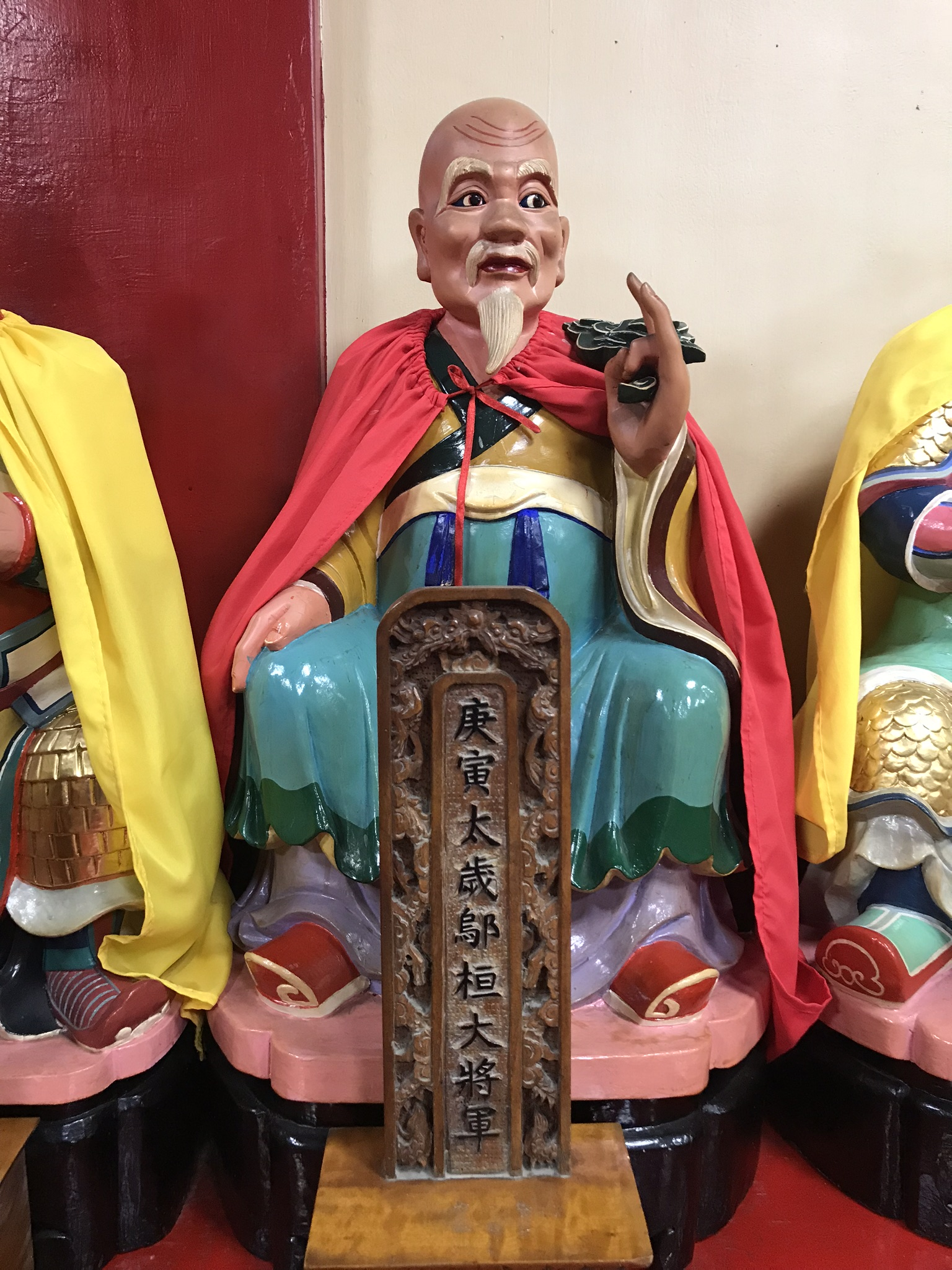 庚寅太歲鄔桓大將軍神像